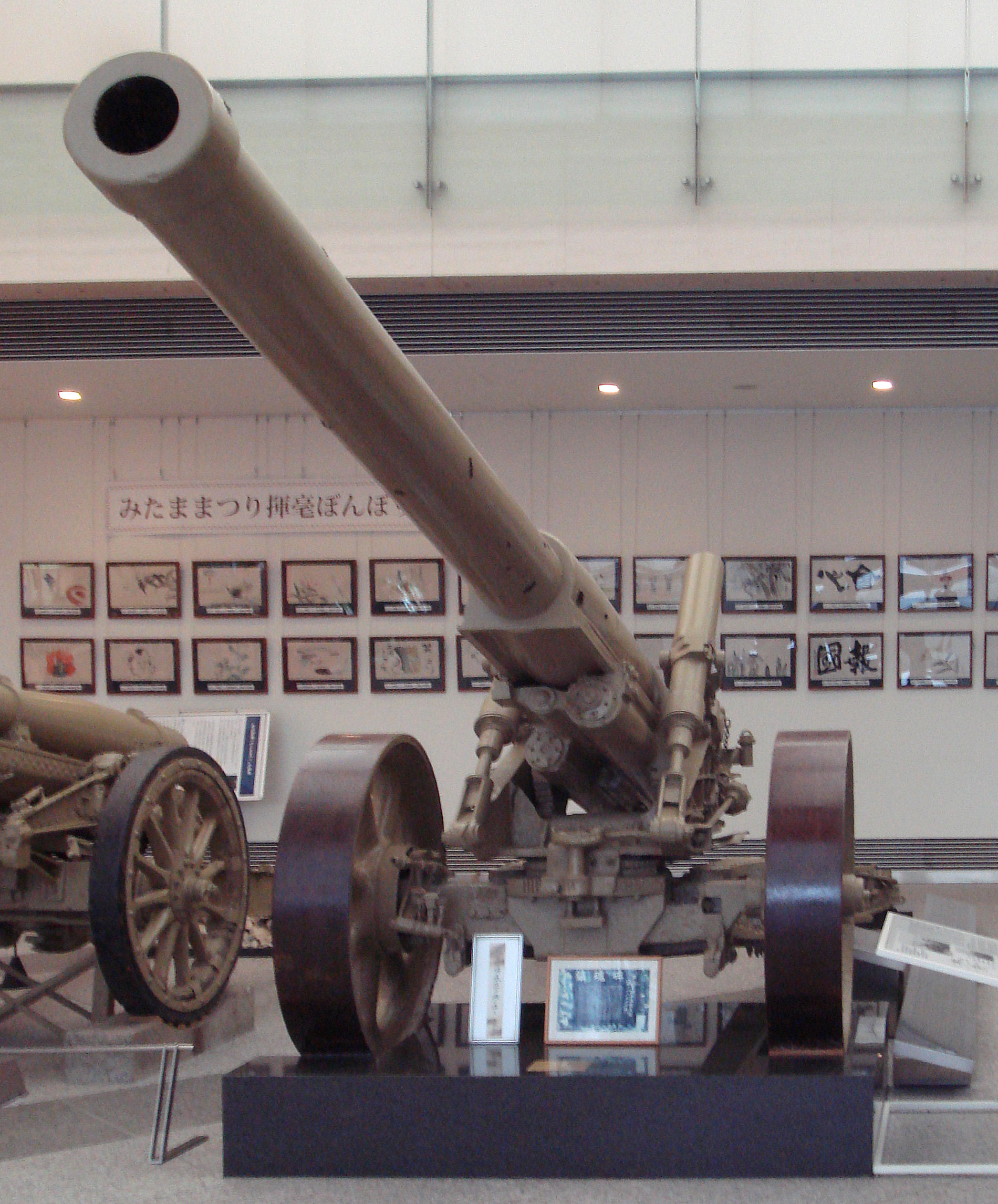 Model_89_15cm_heavy_gun_Japan. Yasukuni Shrine.